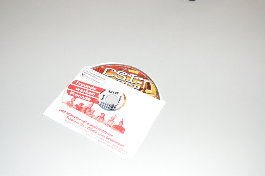 Aussortierung defekter DVDs beim DVD-Verleih